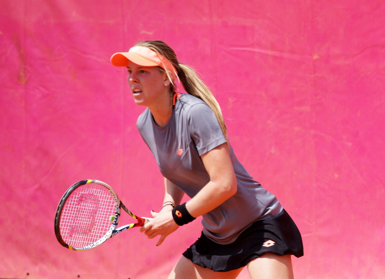 Despina Papamichail ITF Cagnes-sur-Mer 2014